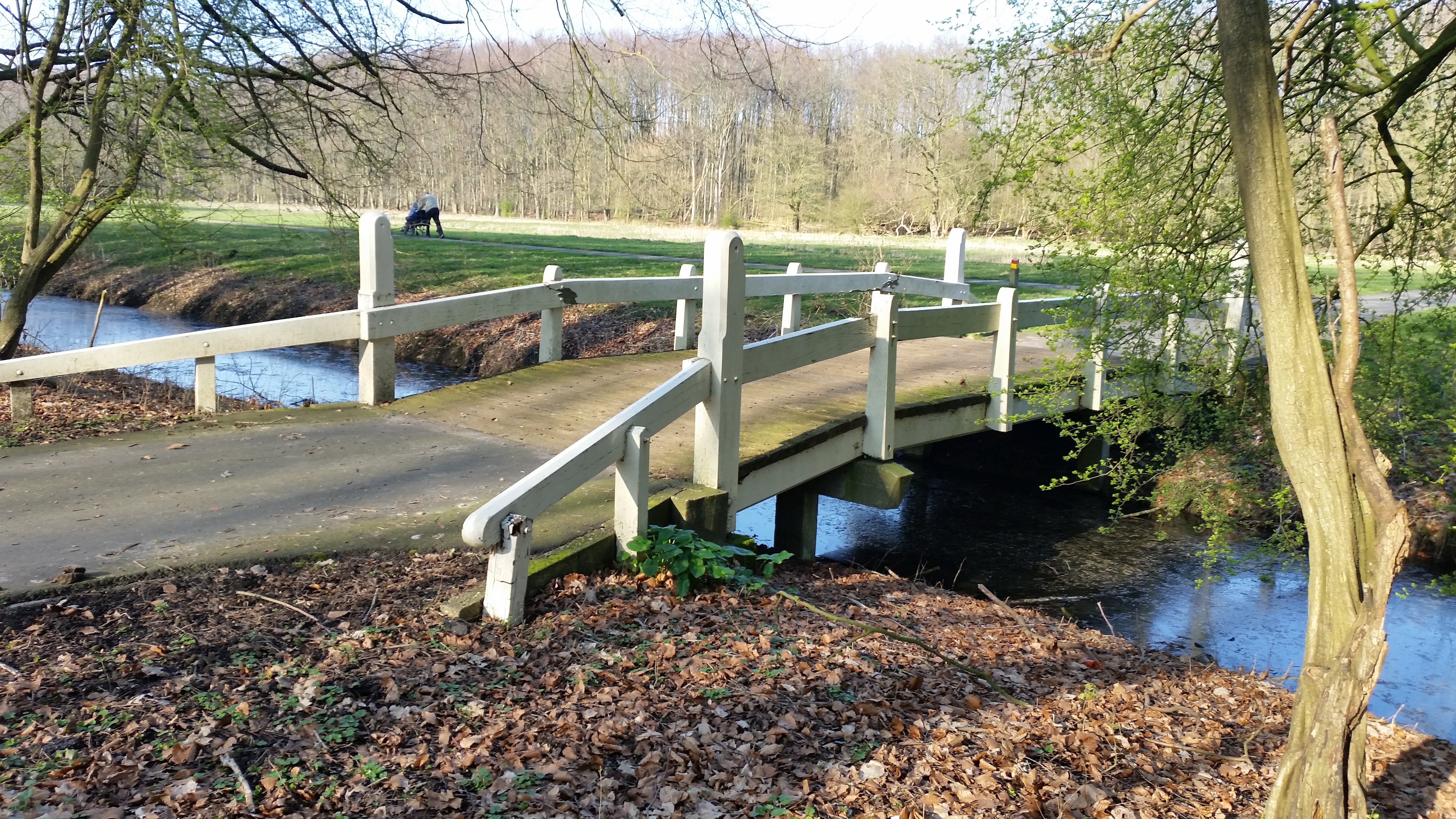 Zijaanzicht van Brug 577 (in Amsterdam)